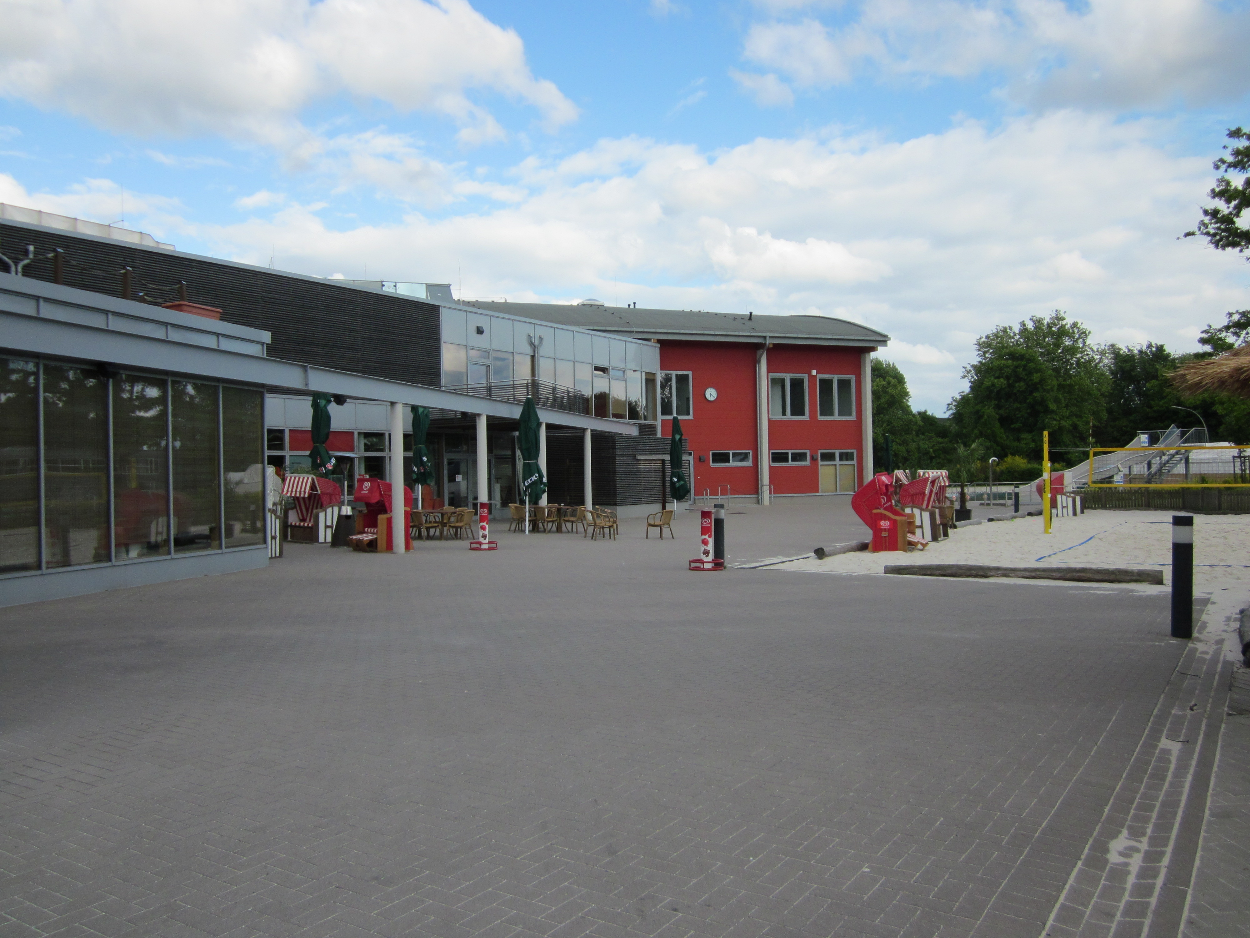 Terrasse des Beach-Centers auf dem Dulsberg.